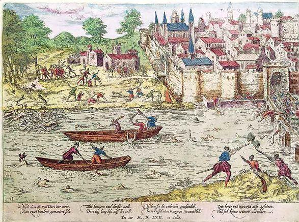 Massacre de Tours en juillet 1562, gravure d'Hoggenberg